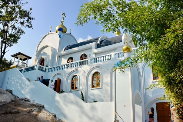 Храм Вознесения Господня на о. Самуи